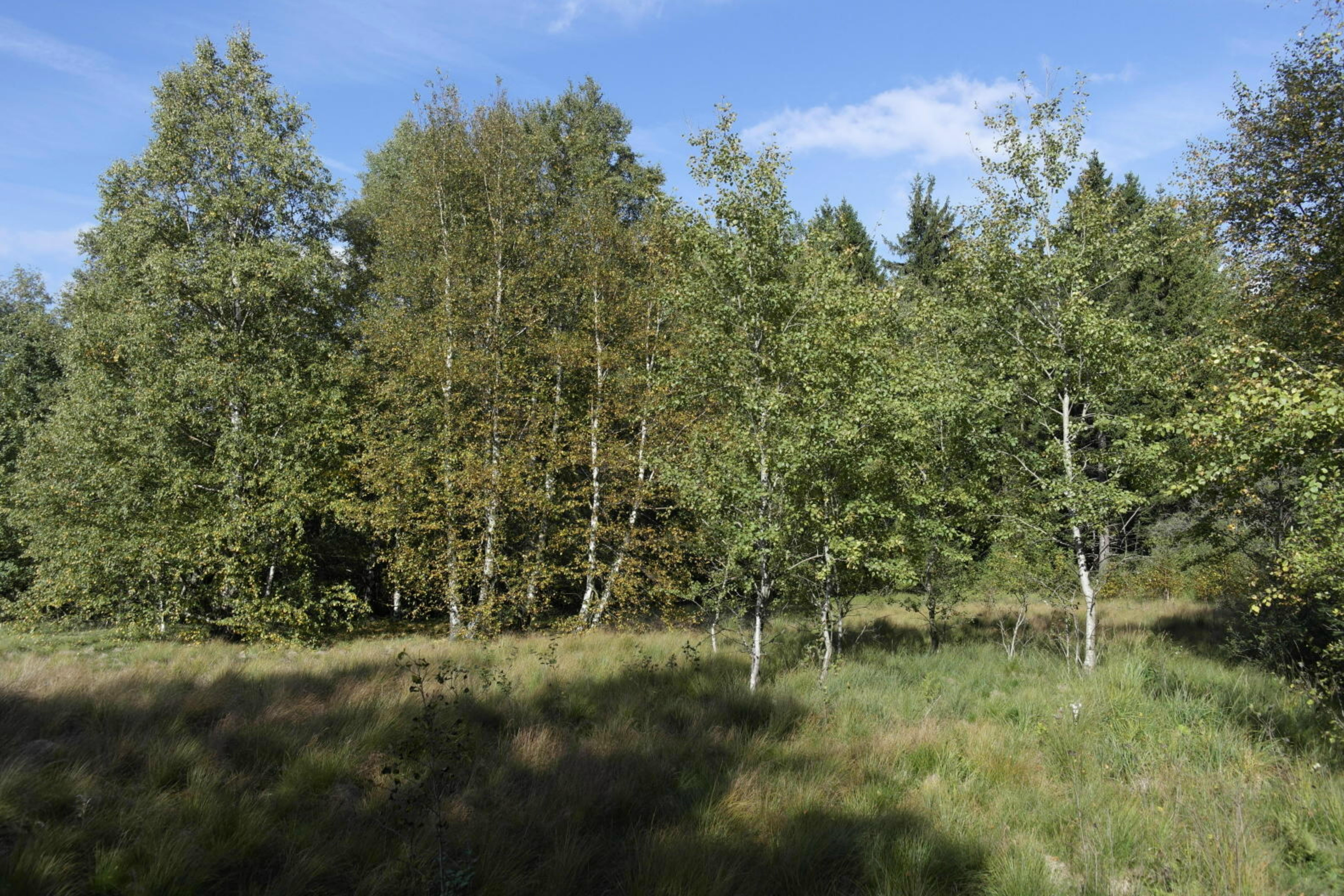 (NSG:BY-NSG-00152.01)_Lange Rhön. Schwarzes Moor im Biosphärenreservat Bayrische Rhön.